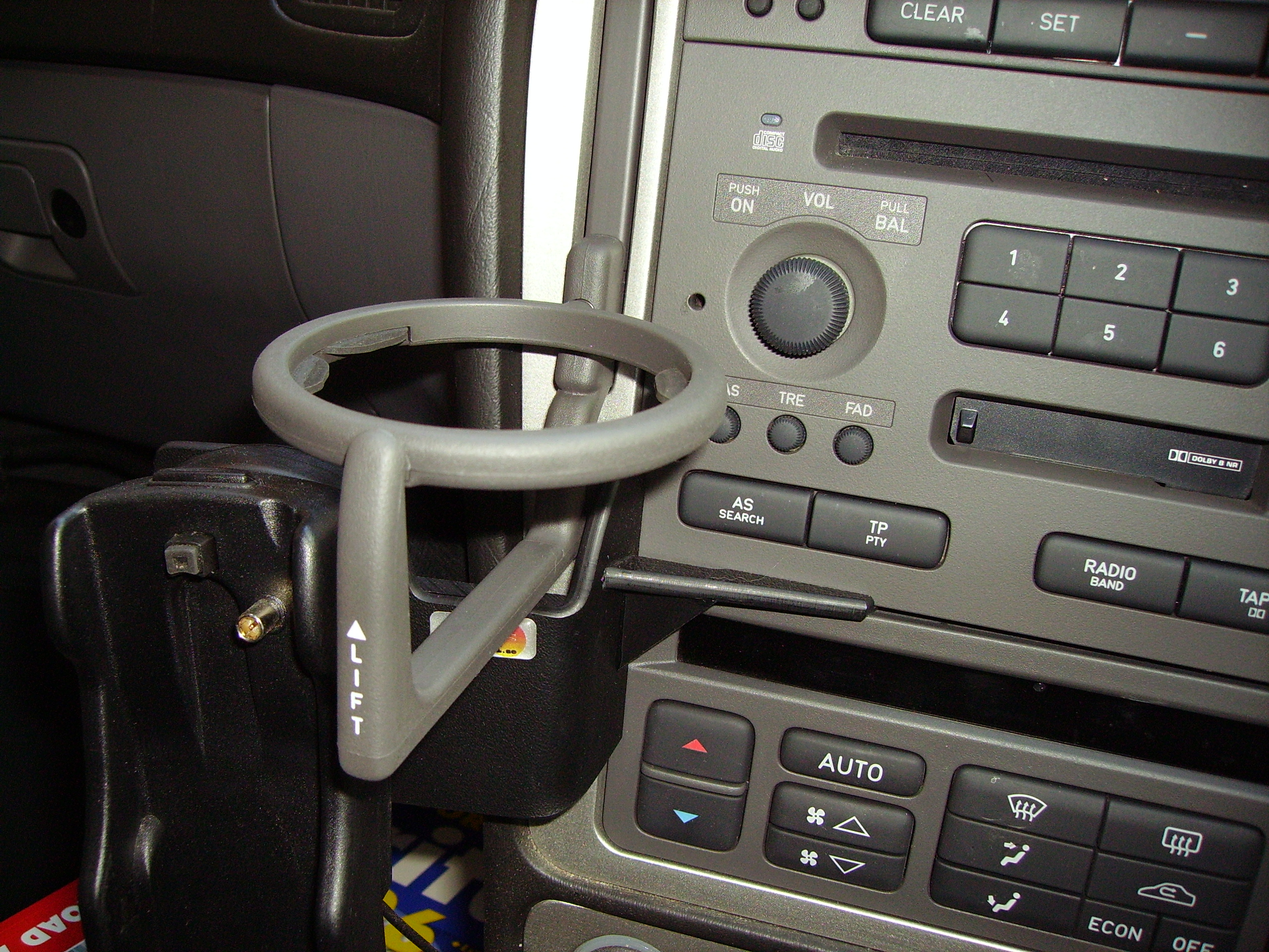 Cupholder (Saab 9-5)